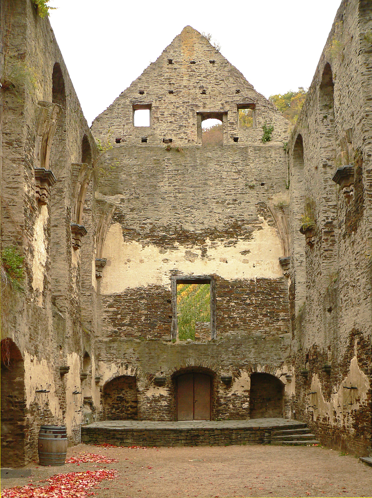 Innenraum der Klosterkirche in Marienthal